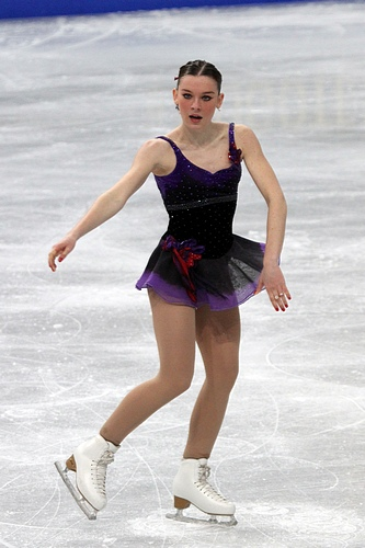 Анита Мадсен (Дания) на чемпионате мира по фигурному катанию среди юниоров 2012